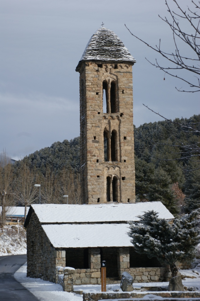 Església de Sant Miquel d'Engolasters